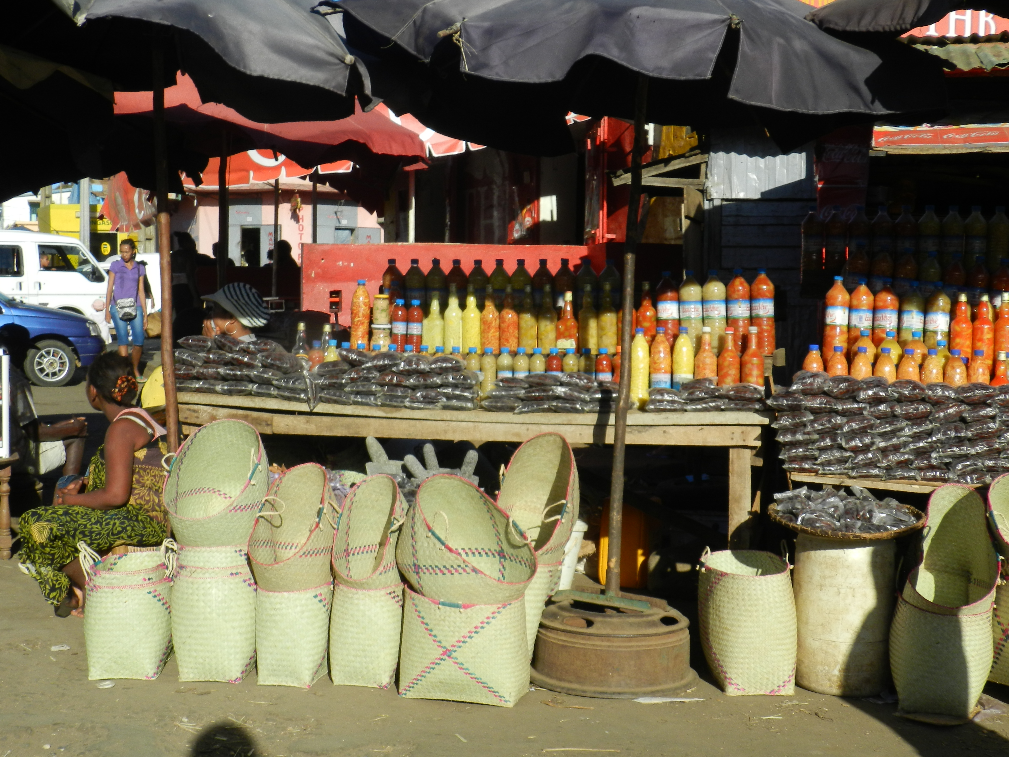 Mercato di Antsiranana